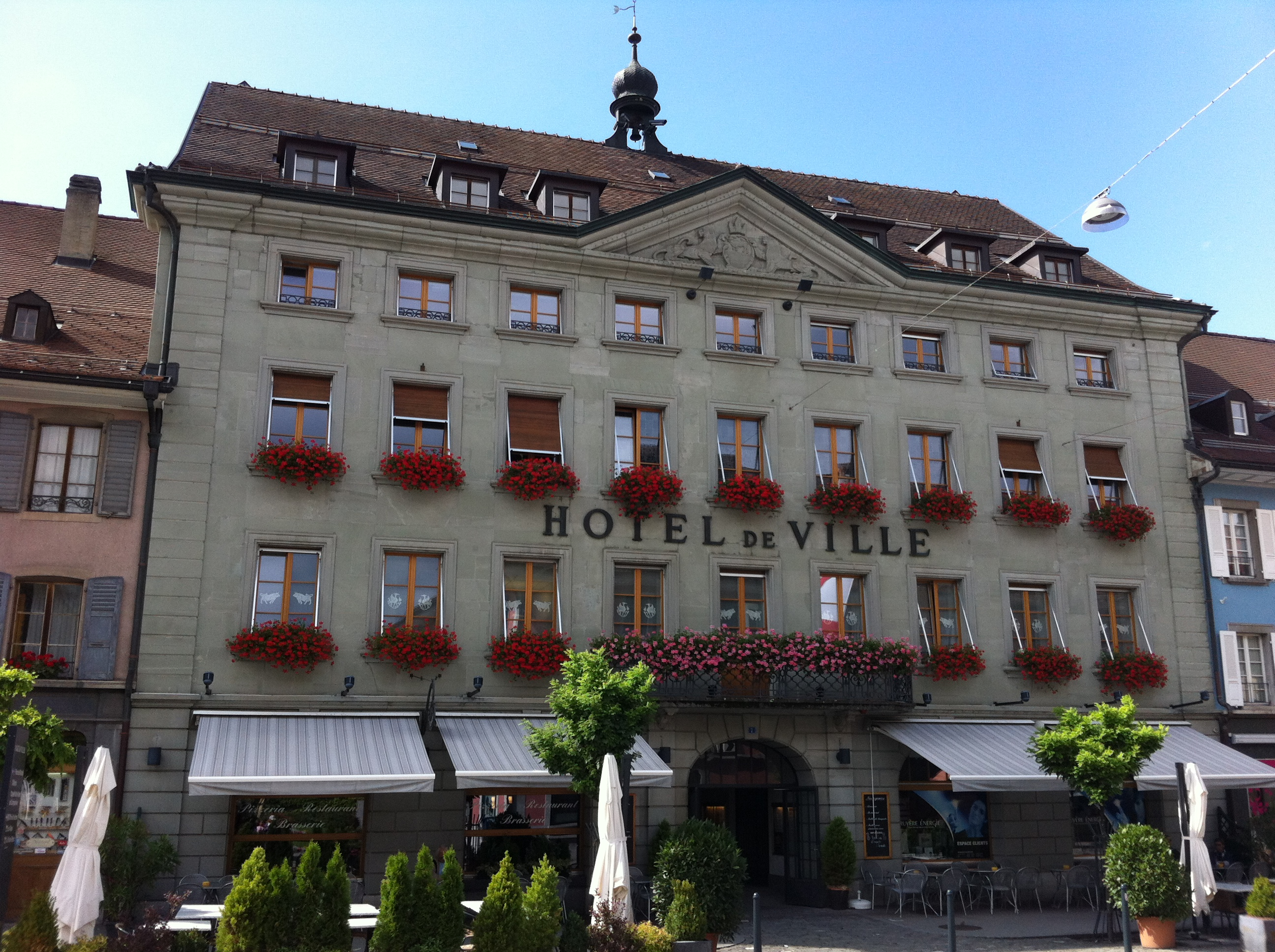 Rathaus, Bulle